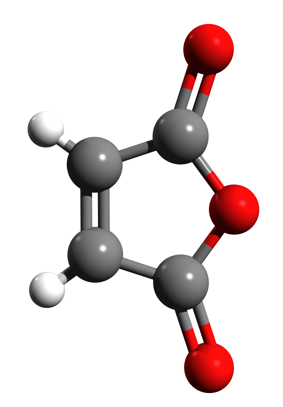 Autore: matti.happy Fonte: propria Descrizione: modello tridimensionale dell'anidride maleica, creato tramite povray